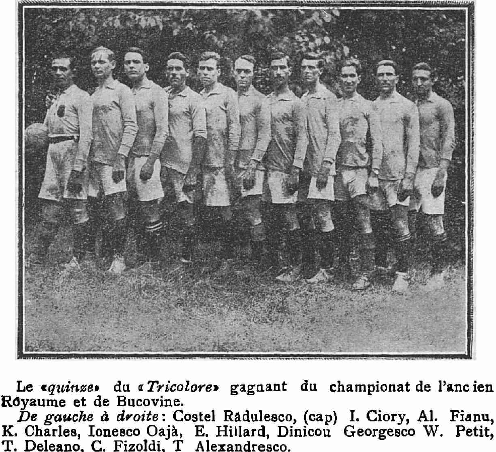 "Tricolor" - echipa de fotbal campioană a României în 1922